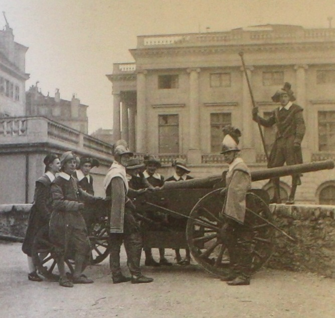 Le Canon et ses servants sur le bastion Mirond. 1950. Photographié par Maurice Wassermann.